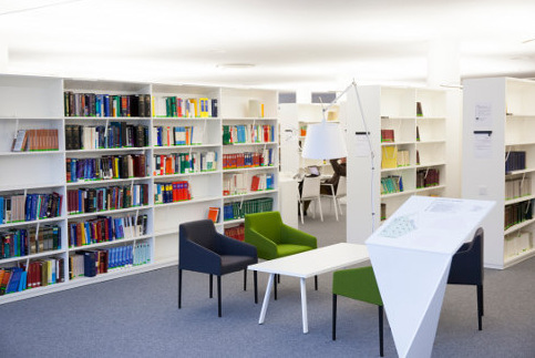 Skaitykla VU bibliotekoje, MKIC